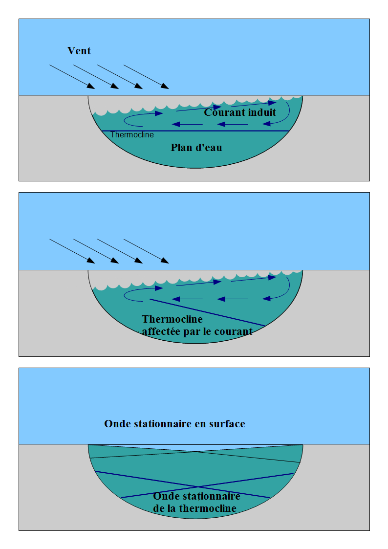 Illustration du phénomène de seiche en hydrologie